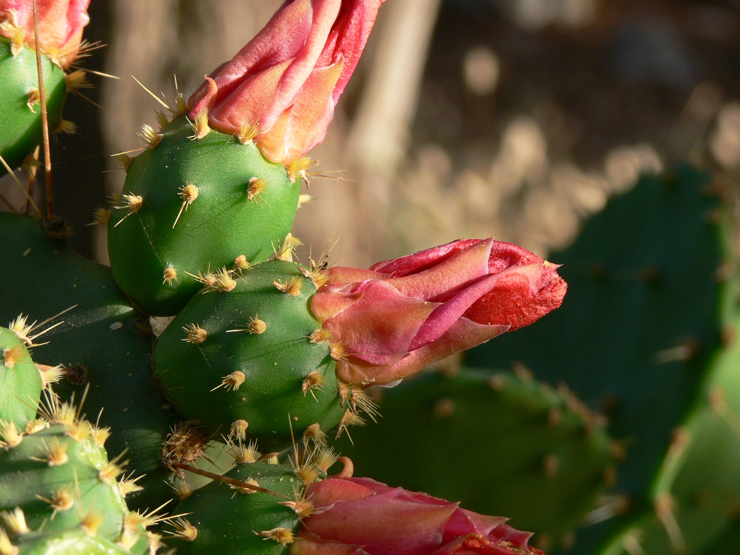 Květy opuncie